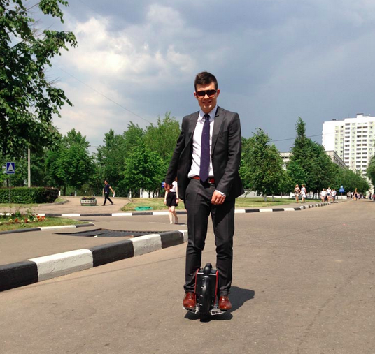 Человек на сегвиле